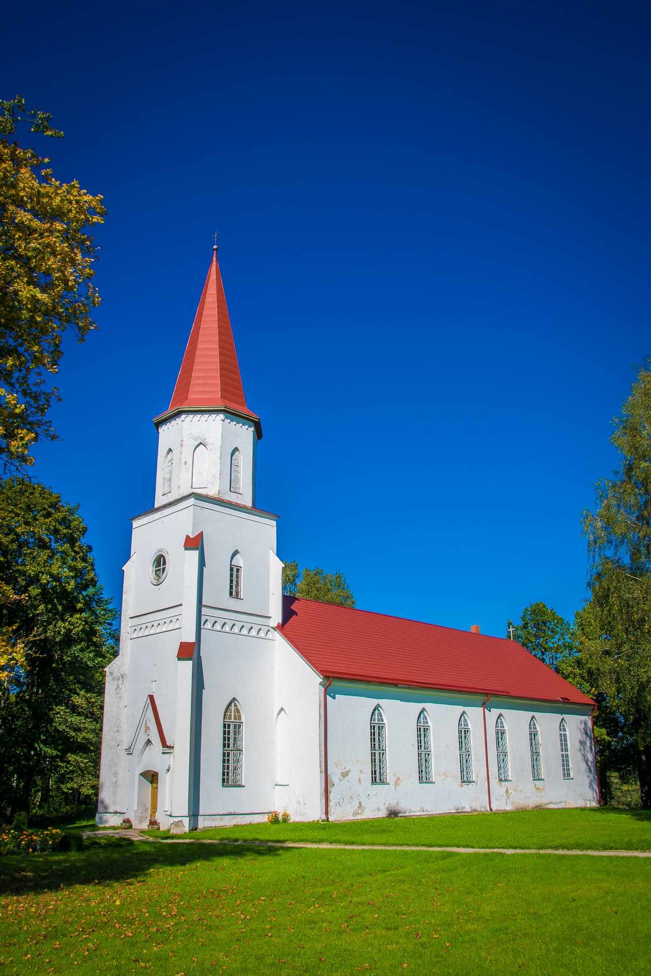 Skujenes luterāņu baznīca, Skujene